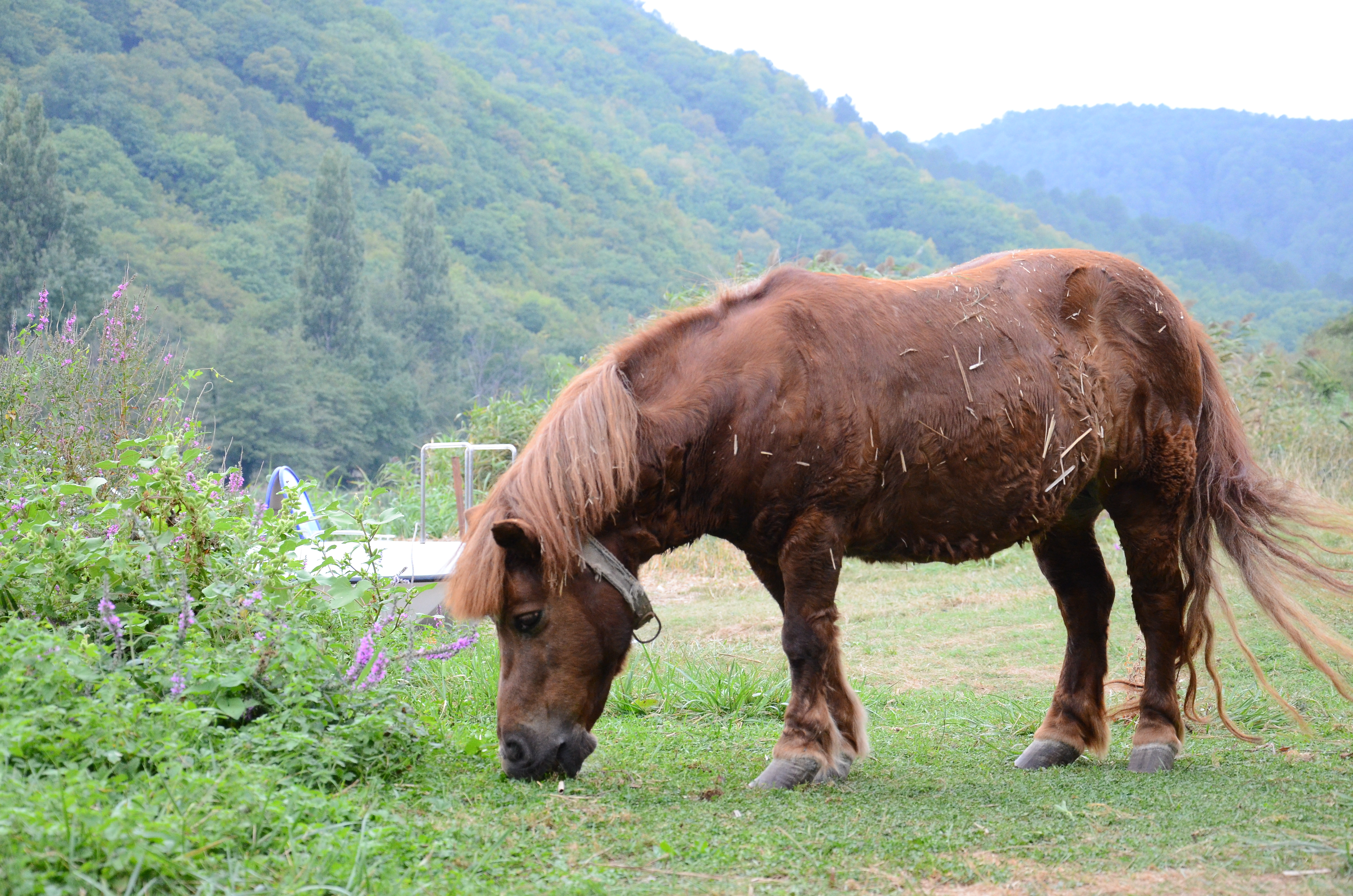 Архипо-Осиповка